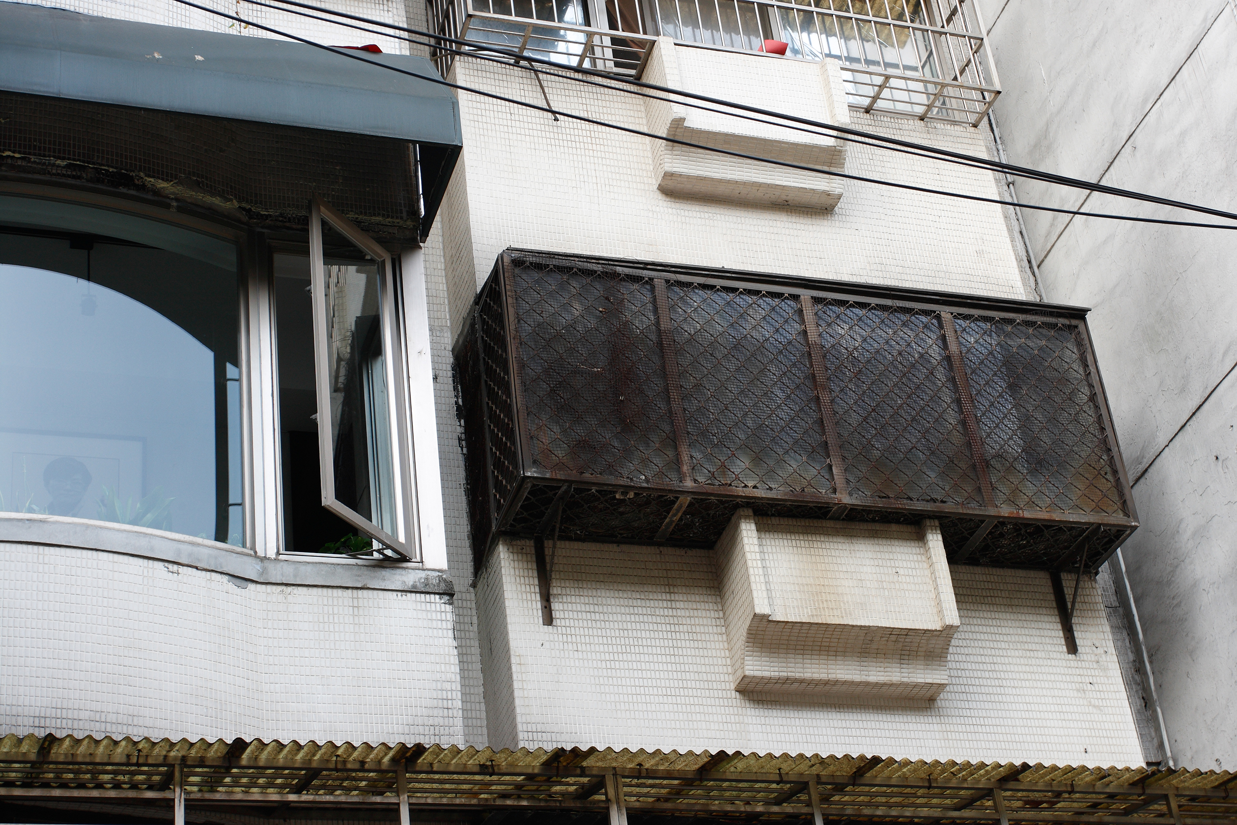 鄭南榕紀念會館